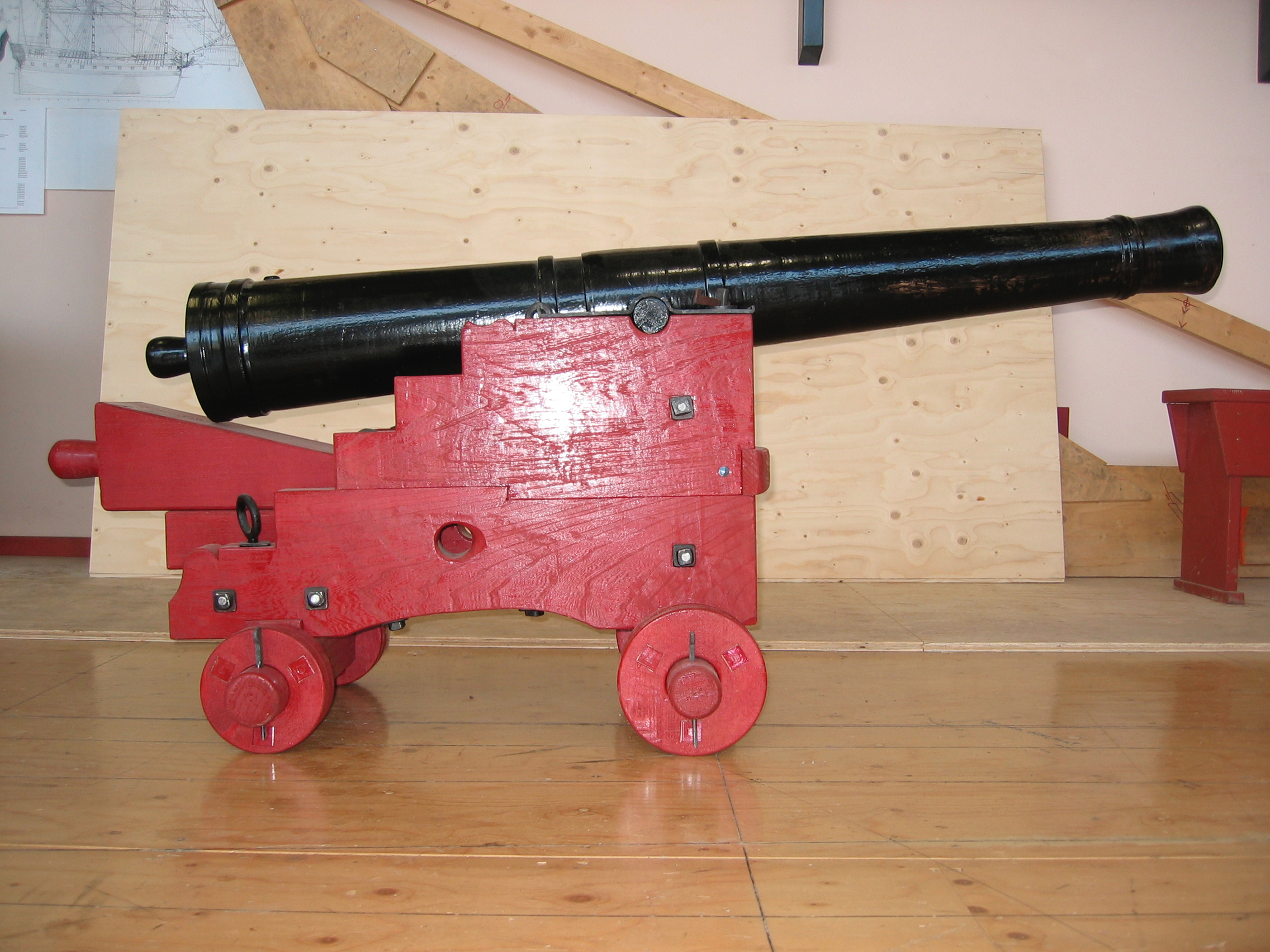 Rolpaard